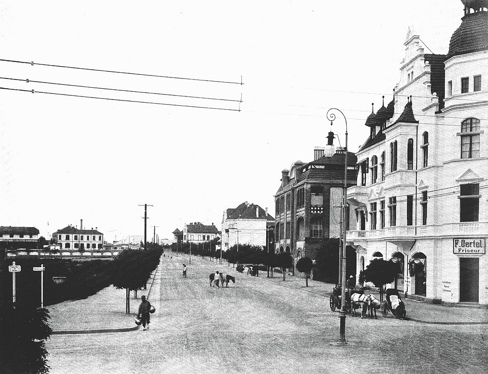 青岛广西路德基洋行及奥尔特尔理发店